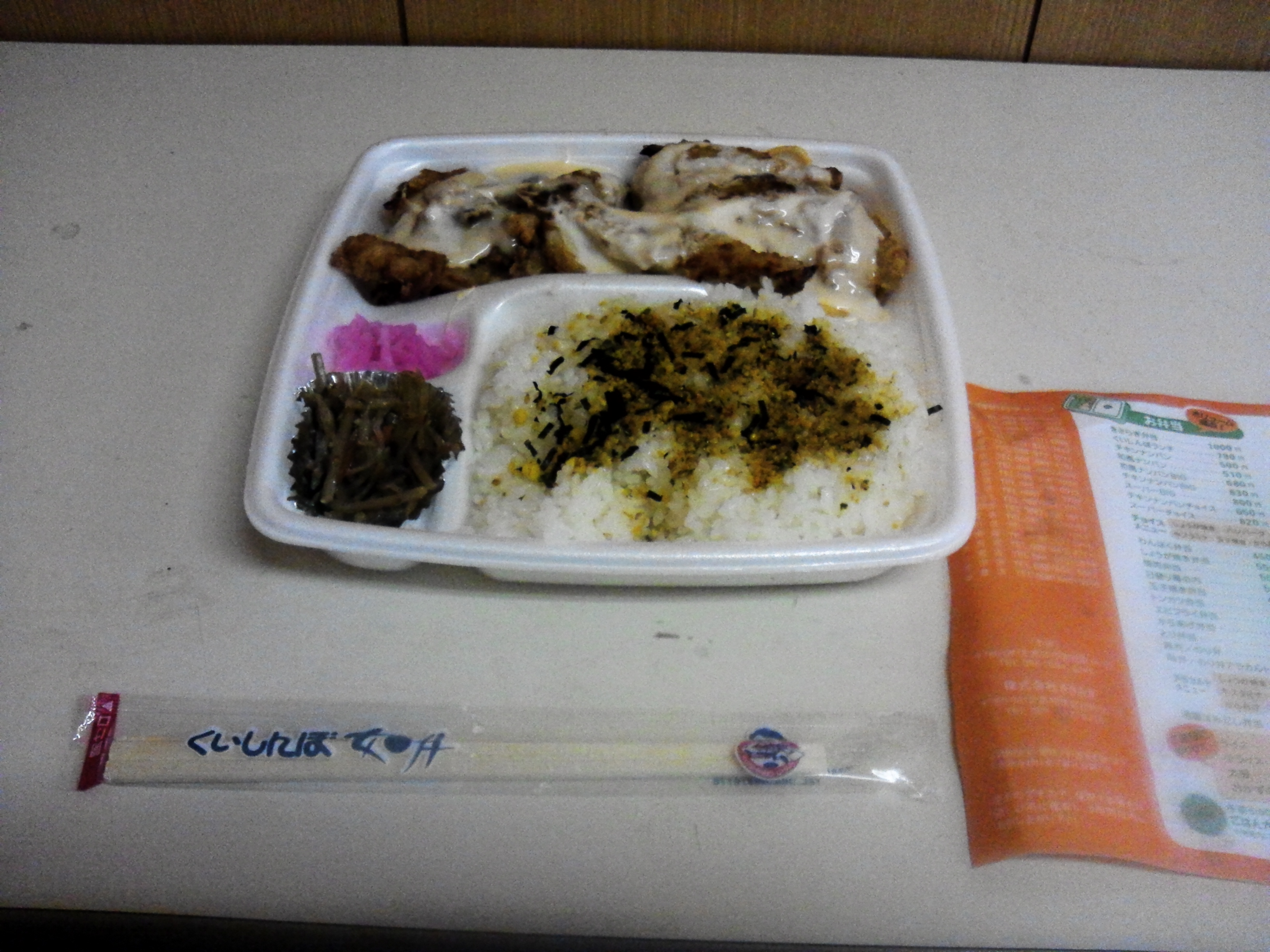 昼食風景です。